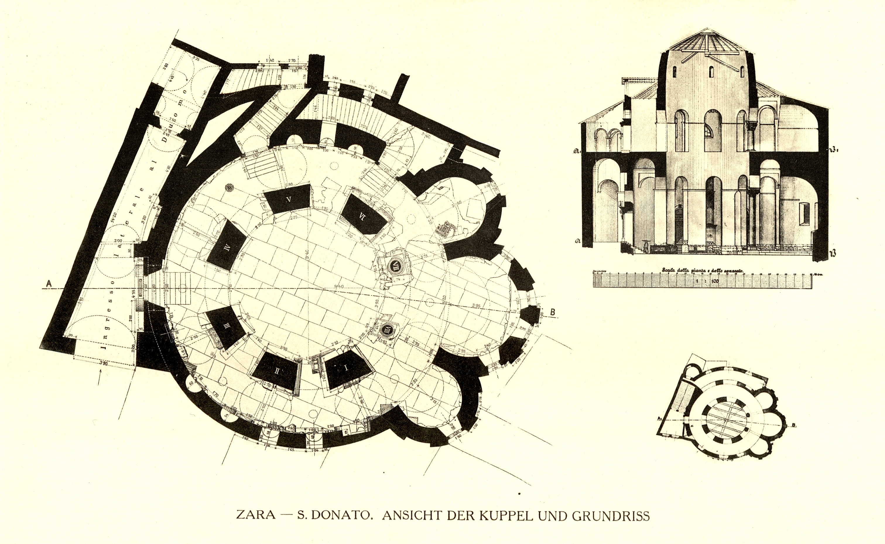 Denkmäler der Kunst in Dalmatien, Herausgegeben von Georg Kowalczyk, mit einer Einleitung von Cornelius Gurlitt. 132 Lichtdrucktafeln nach Naturaufnahmen des Herausgebers Georg Kowalczyk sowie nach Kupfern aus dem Werke von Robert Adam: Ruins of the Palace of the Emperor Diocletian at Spalat(r)o, 1764 Wien, 1910, Verlag von Franz Malota